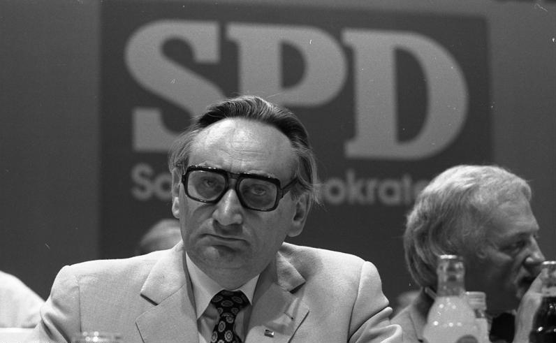 Außerordentlicher Parteitag der SPD in der Westfalenhalle Dortmund Information added by Wikimedia users.de: rechts neben Egon Bahr sitzt Hermann Heinemann, Gewerkschafter, Politiker, Minister für Arbeit, Gesundheit und Soziales NRW (GND 156824914) (?) oder (GND 151741603) (?)